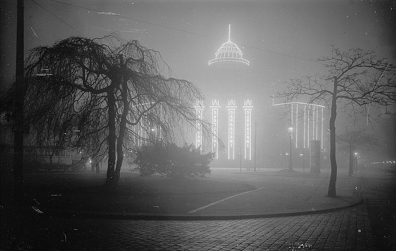 Original image description from the Deutsche Fotothek Dresden. Zirkus Sarrasani